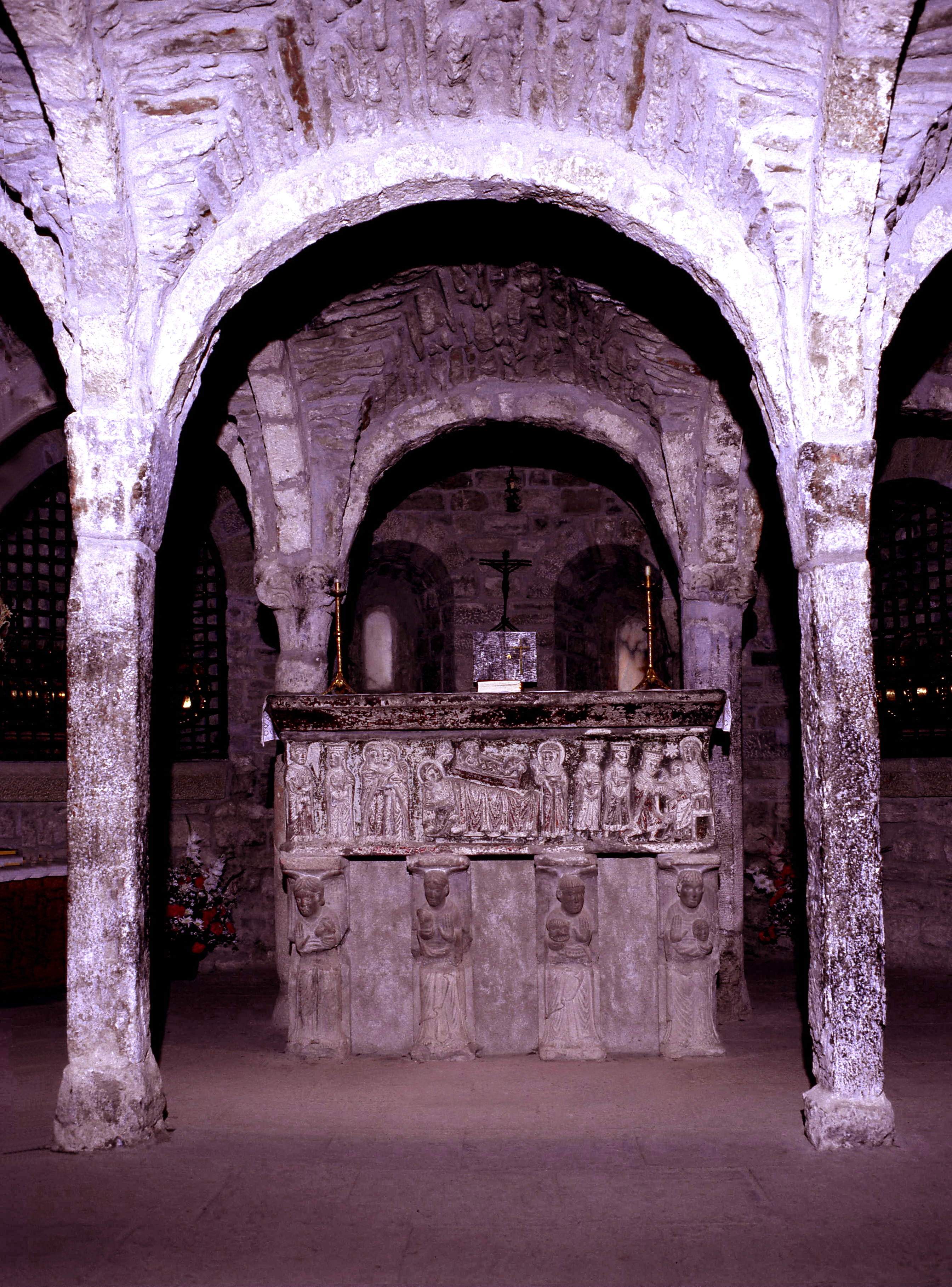 Sarcòfag de Sant Ramon de Roda (1067 - 1126) Catedral de Roda d'Isàvena, (Huesca, Aragón España)